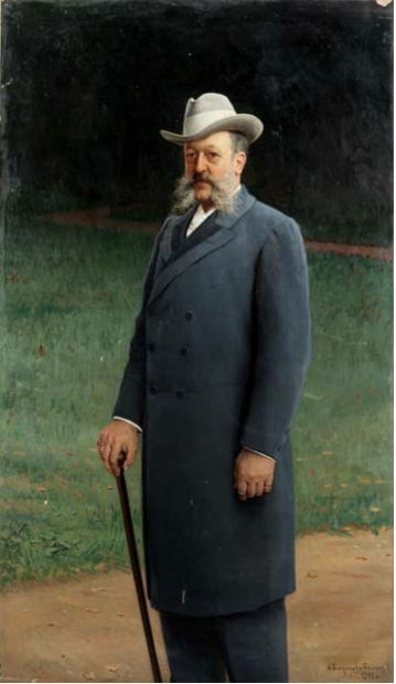 Николай Петрович Богданов-Бельский. Портрет Василия Ивановича Солдатенкова, 1898 г. ГИМ